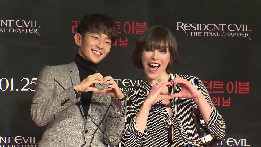 영화 '레지던트 이블:파멸의 날' 밀라 요보비치 내한. 이준기와 함께 사진을 촬영.